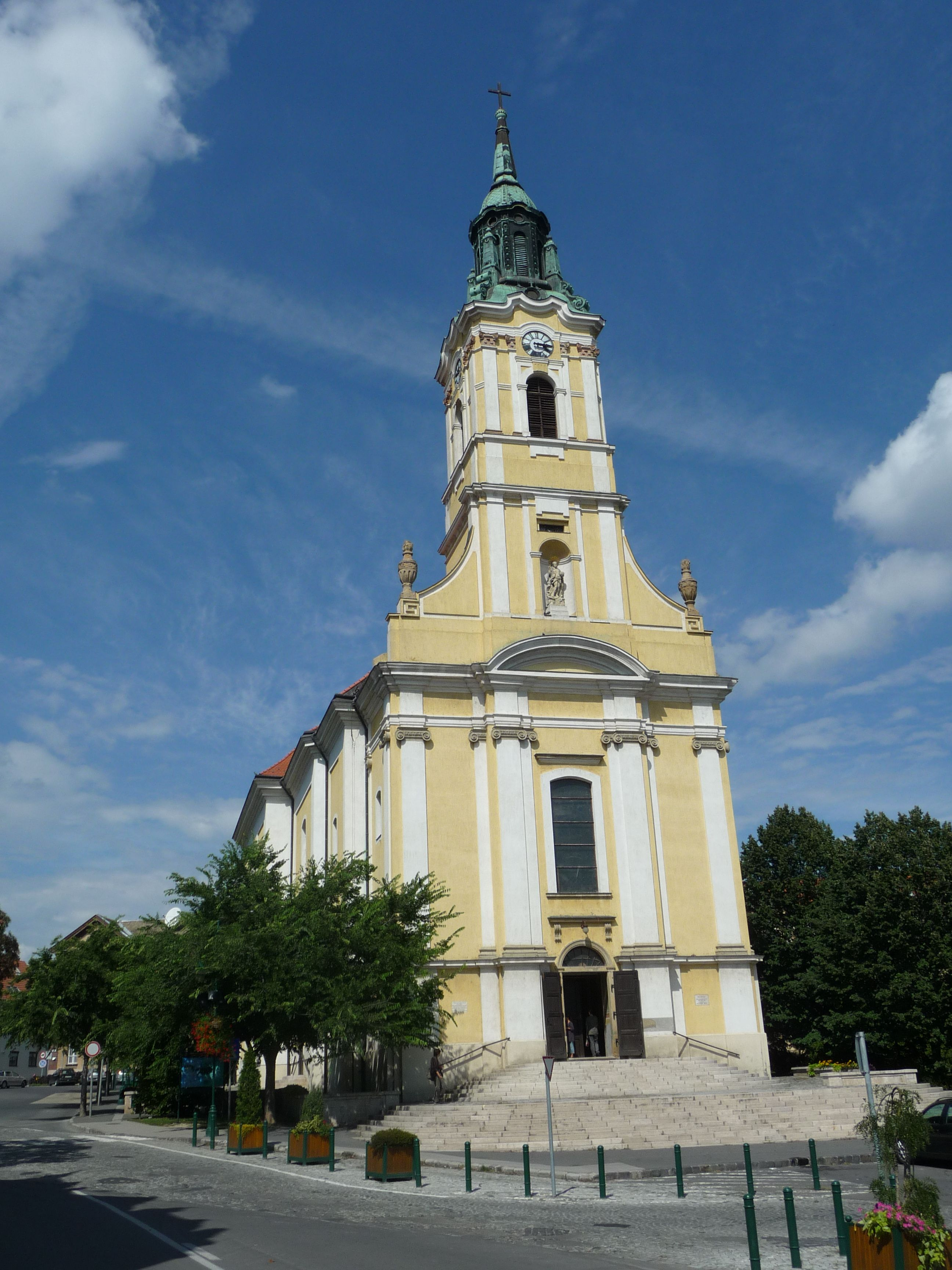 Belvárosi katolikus templom, Szekszárd